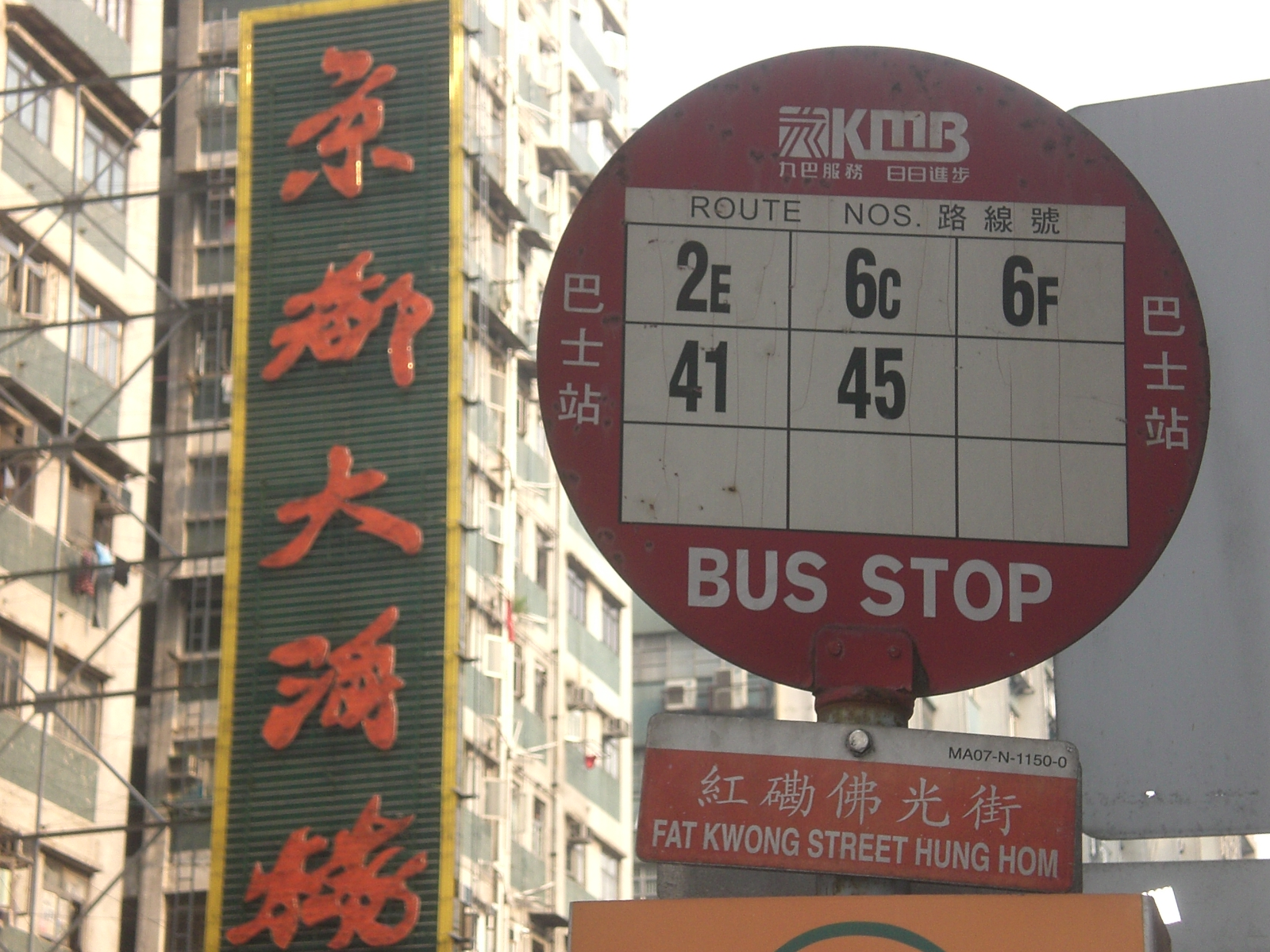 香港紅磡馬頭圍道京都大酒樓，近佛光街